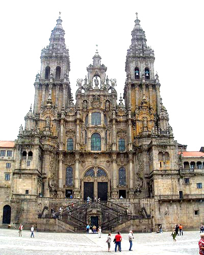 Westwerk der Pilgerkirche in Santiago de Compostela (Galicien, Spanien)